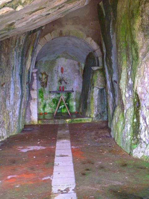 L'interno della cappella rupestre di Sant'Angelo in Sasso o Sant'Angelo de Saxo a Cerreto Sannita (BN).